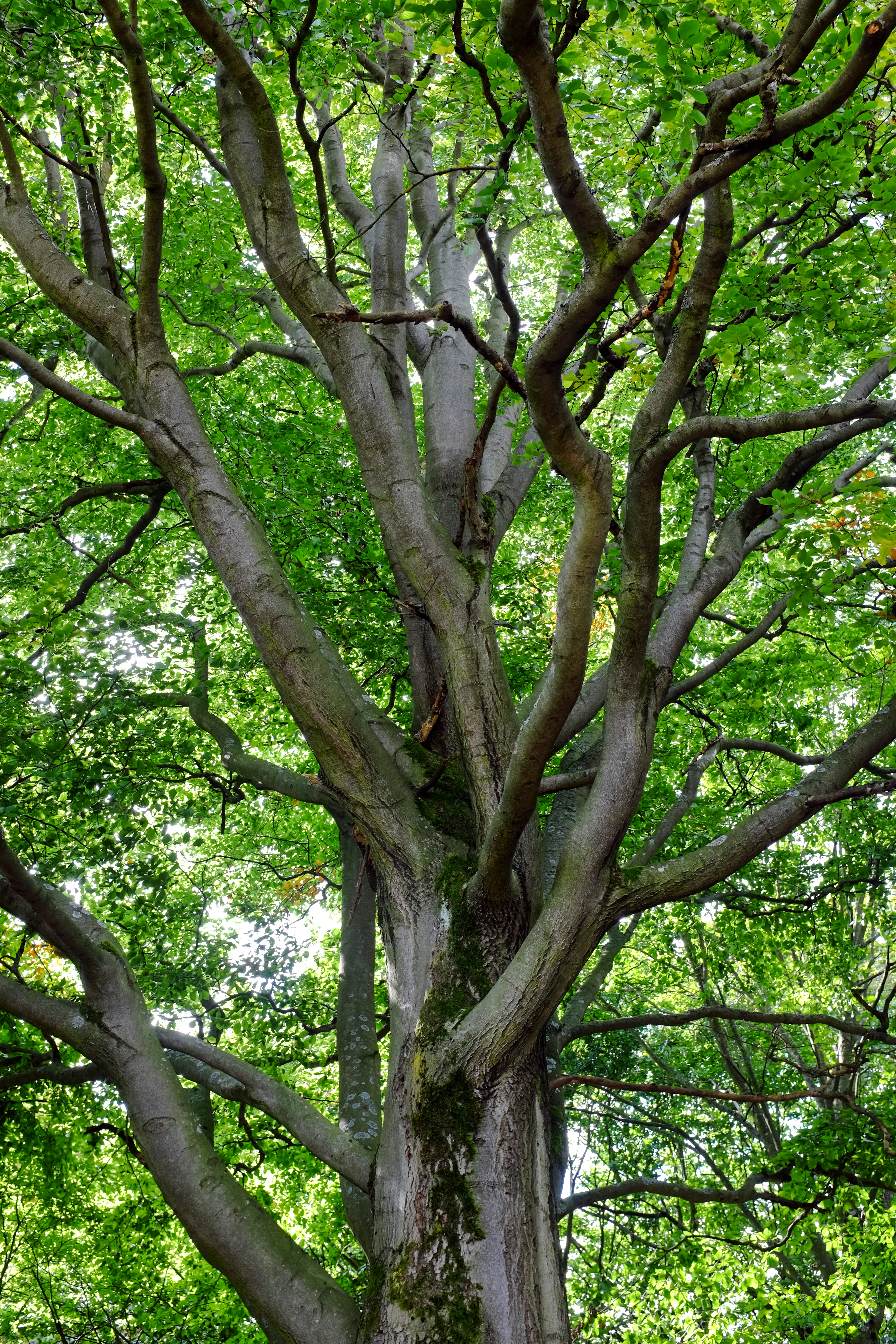 Památný strom - Buk u Krásné Lípy - Krásná Lípa, okres Sokolov